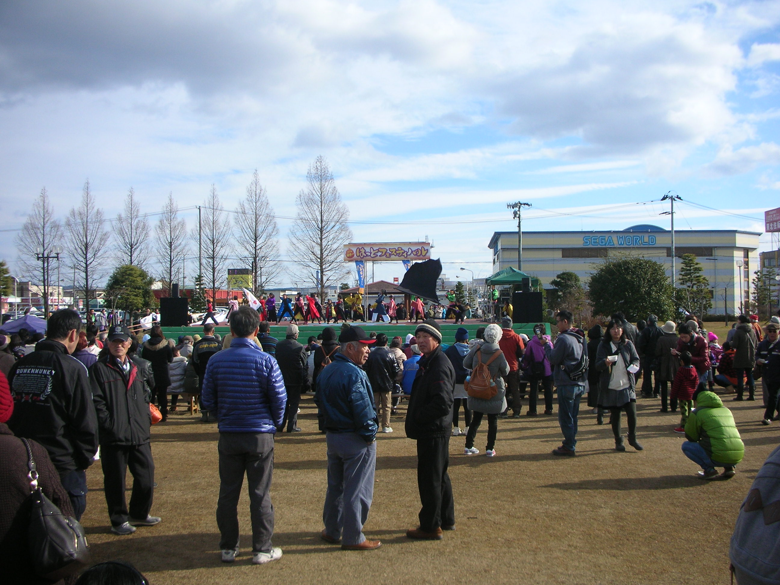 日本一はっとフェスティバルでのステージイベント 2015